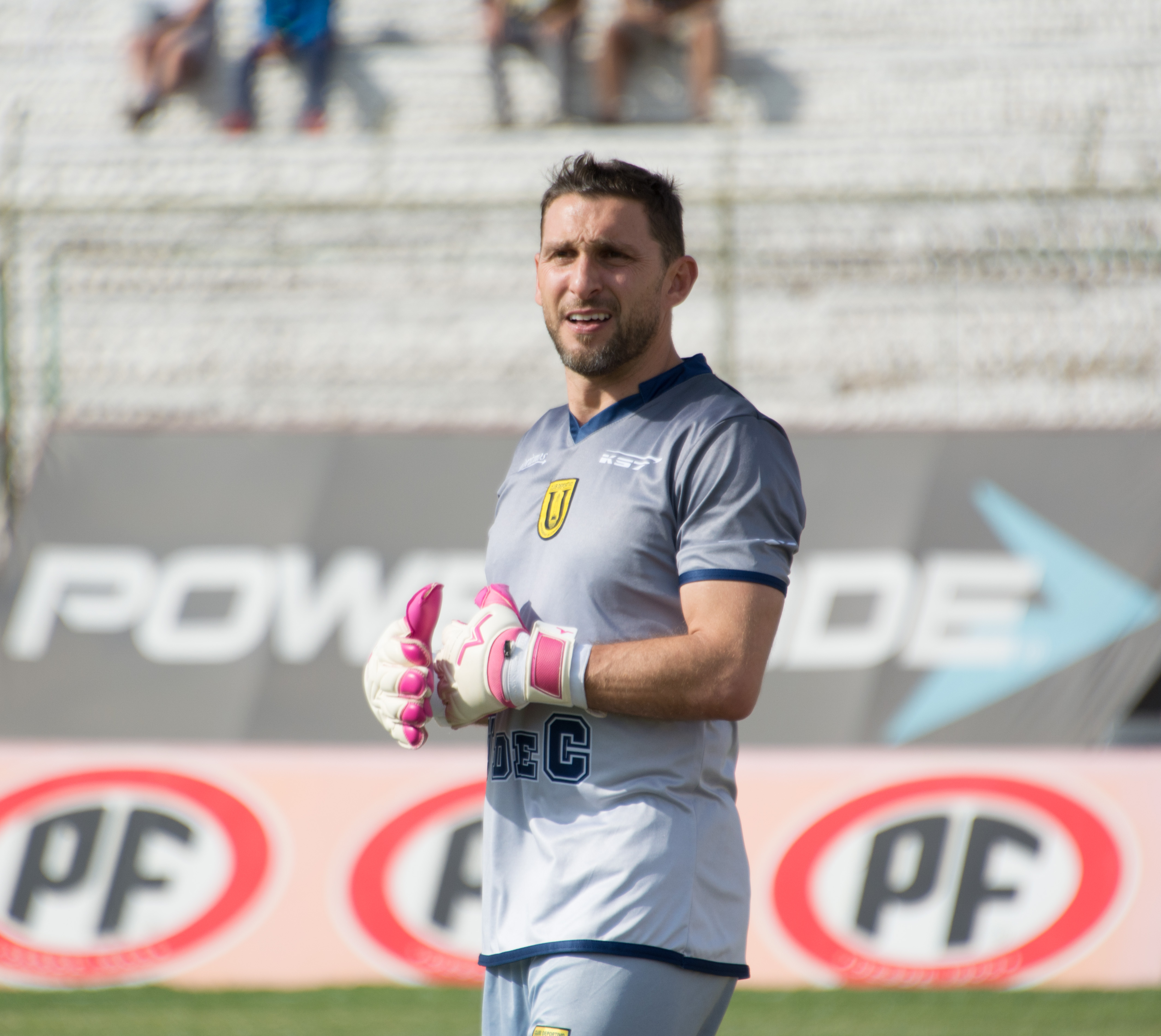 Cristián Muñoz, Palestino v Universidad de Concepción, Estadio Municipal de La Cisterna, La Cisterna, Santiago, Chile.